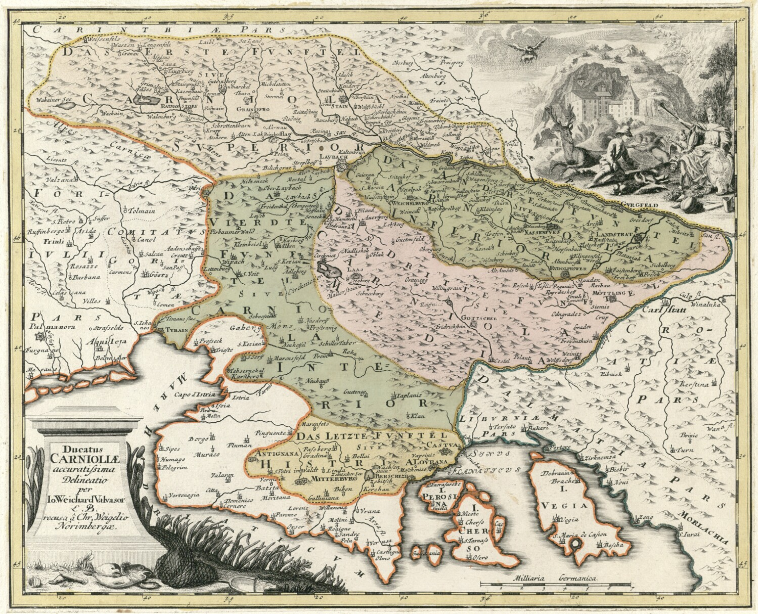 Ducatus Carnioliae accuratissima Delineatio per